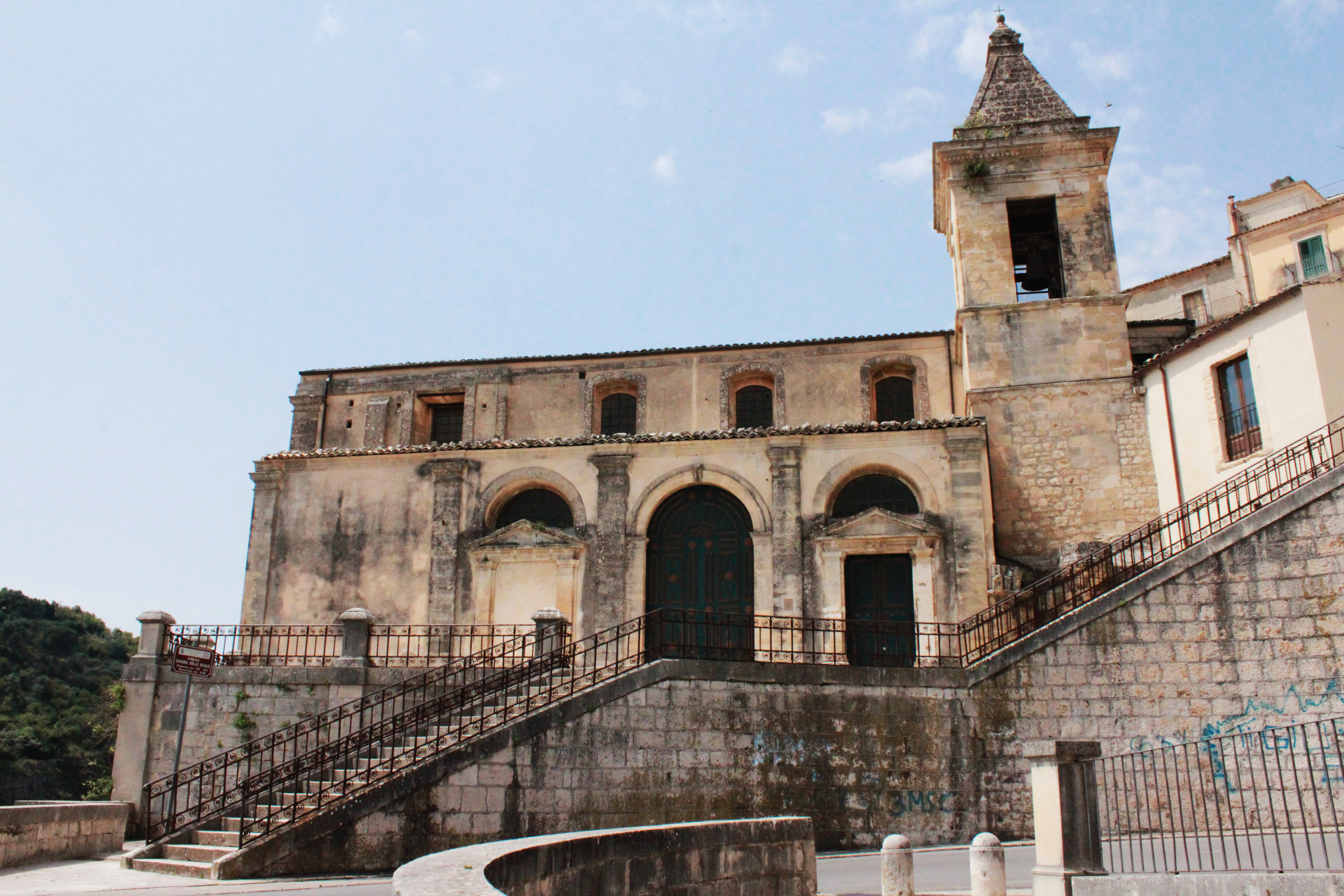 facciata Chiesa S.Maria delle scale a Ragusa - Sicilia